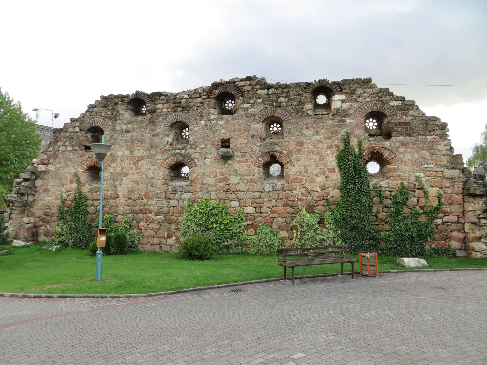 Prilep, Macedonia (FYROM)